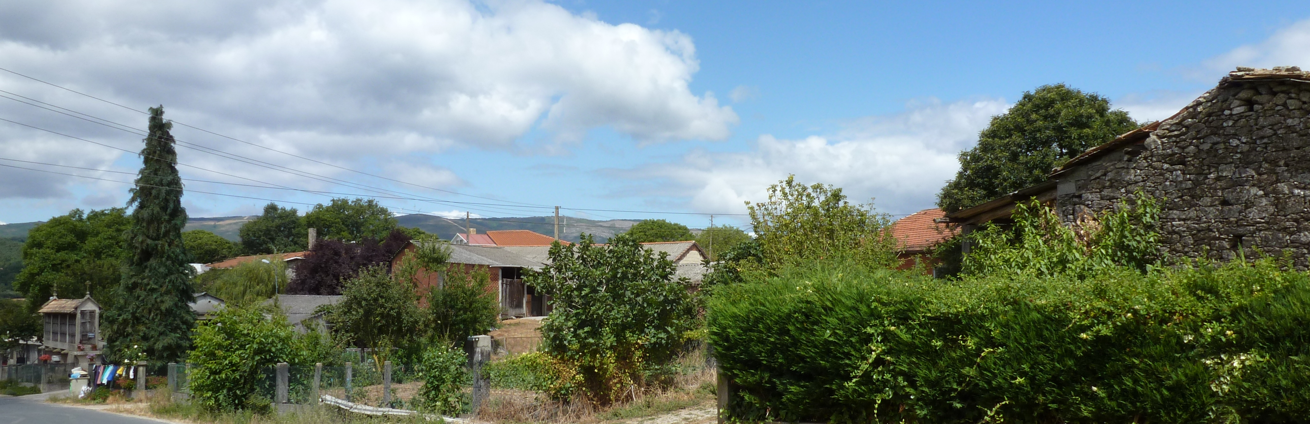 Lugar de Vilaguillulfe, parroquia de Cartelos, concello de Carballedo, Lugo